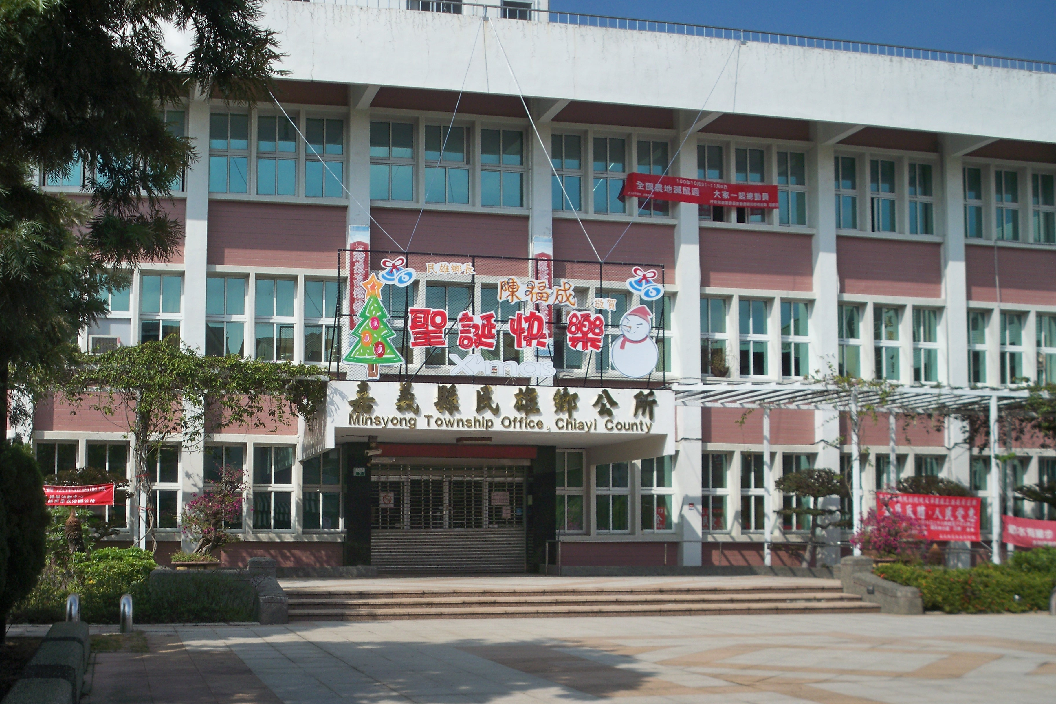 中文（台灣）: 嘉義縣民雄鄉公所慶祝聖誕節。